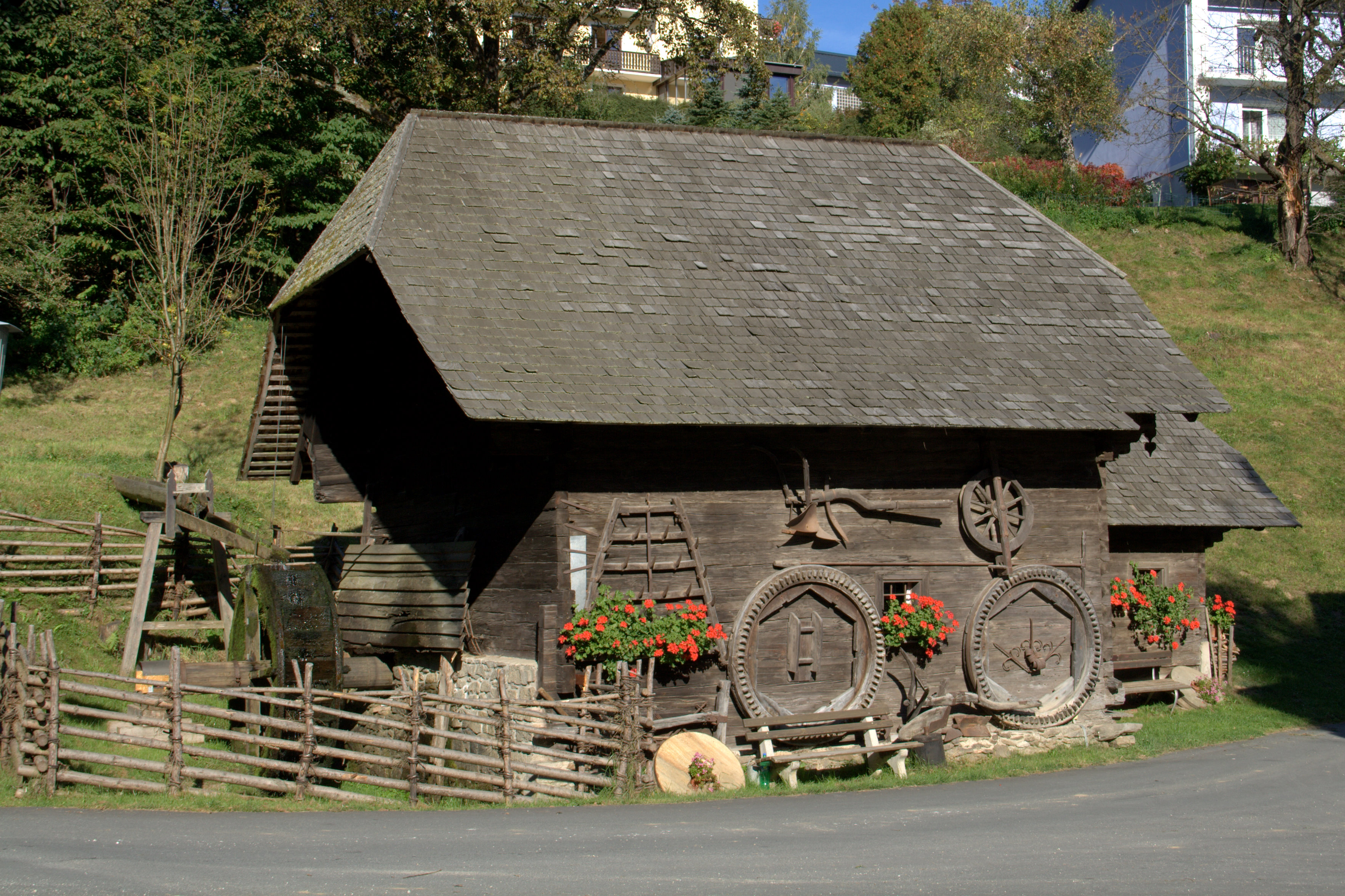 Heimatmuseum, Heimathaus